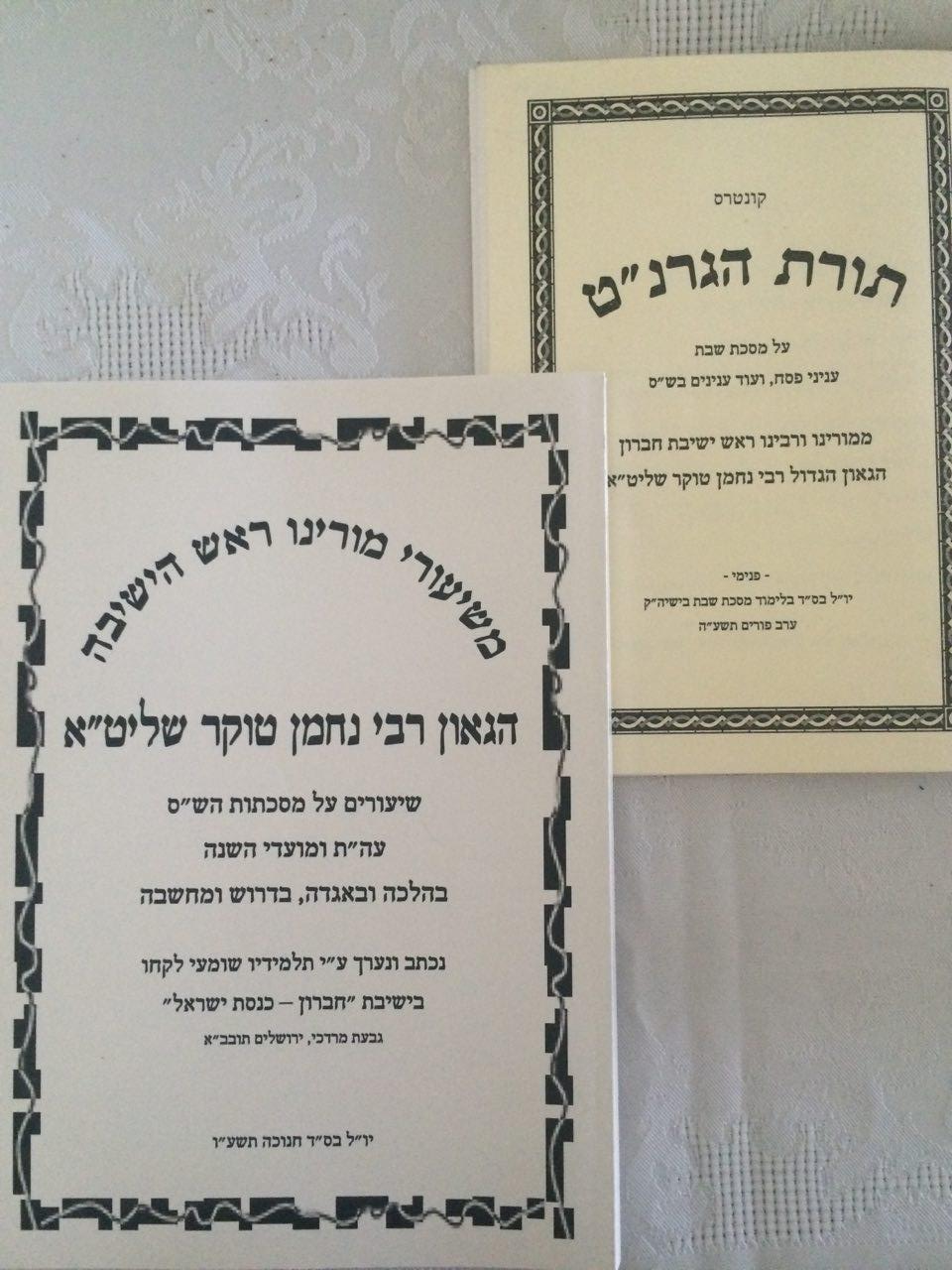 קונטרסי חידושיו של הרב טוקר